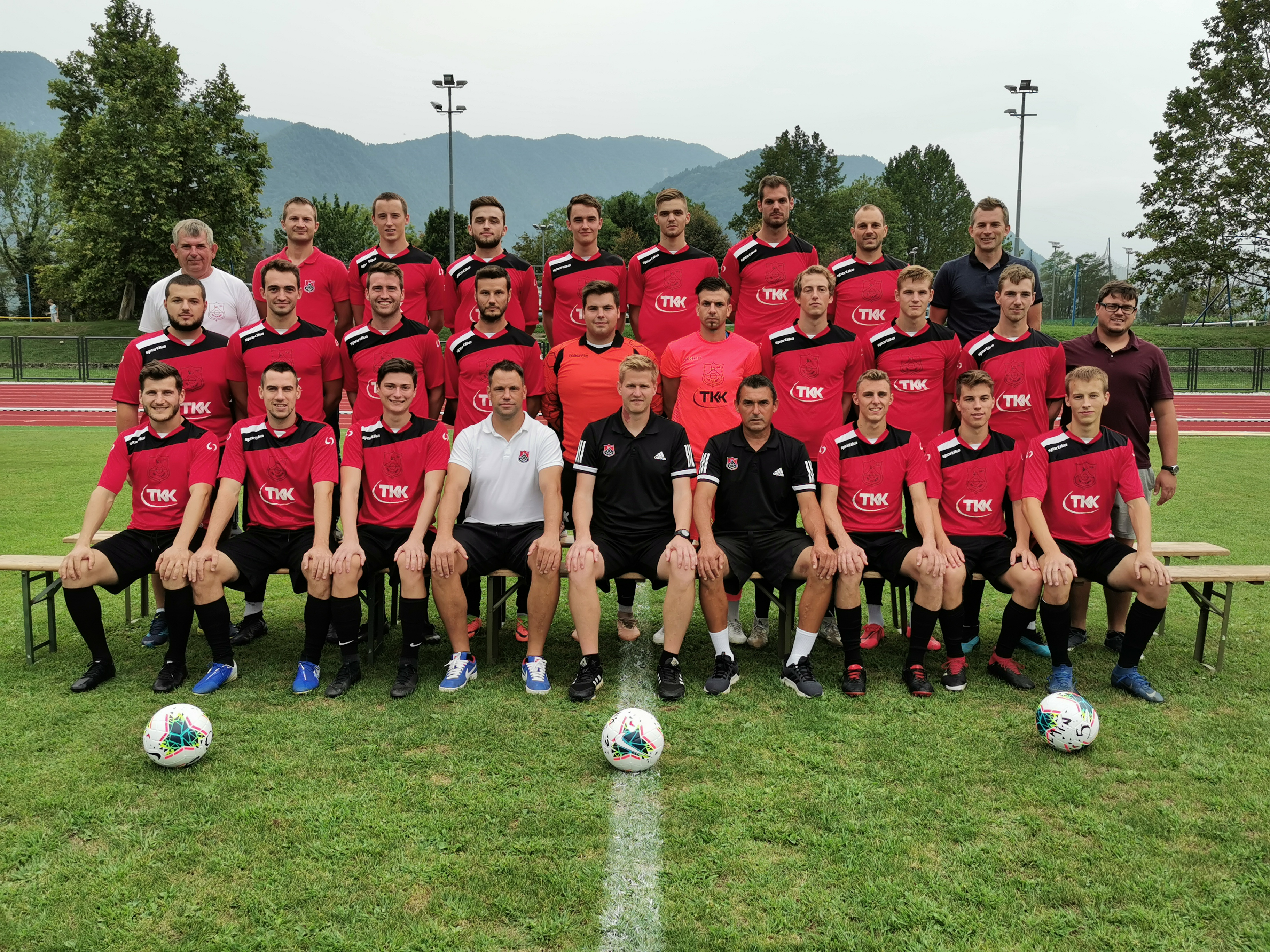 Slika aktualnega moštva Nogometnega kluba Tolmin za sezono 2019/2020. Slikano v Tolminu na Brajdi.